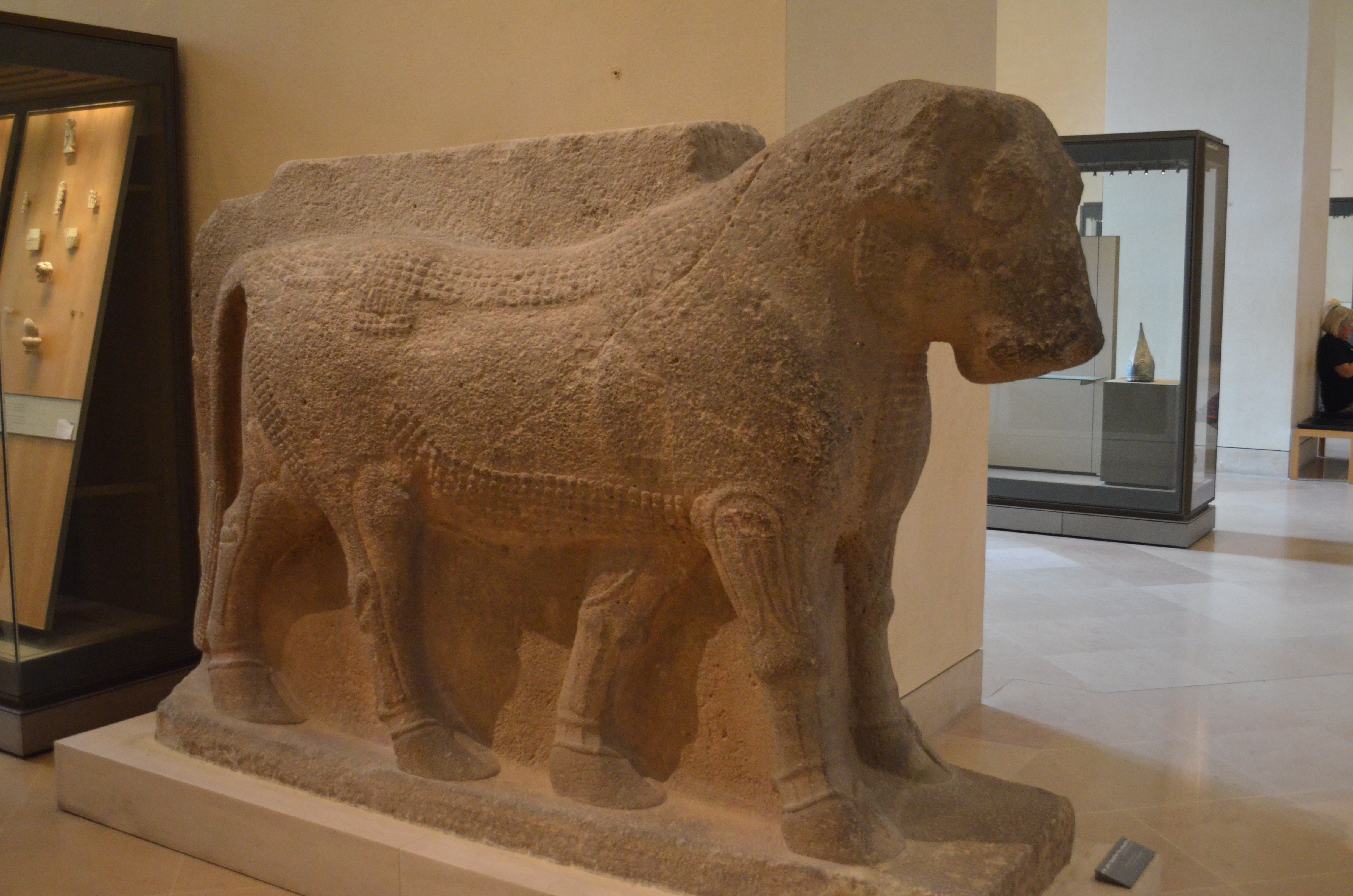 Taureau gardien des portes, 744-727 av. J.-C., Arslan-Tash (ancienne Hadatu), entrée du temple d'Ishtar.